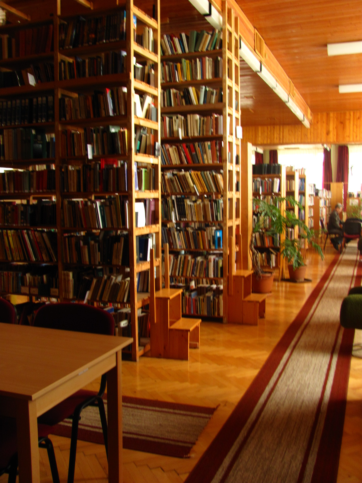 a könyvtár belülről